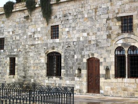 Façade de l'ancienne synagogue de Deir el-Qamar